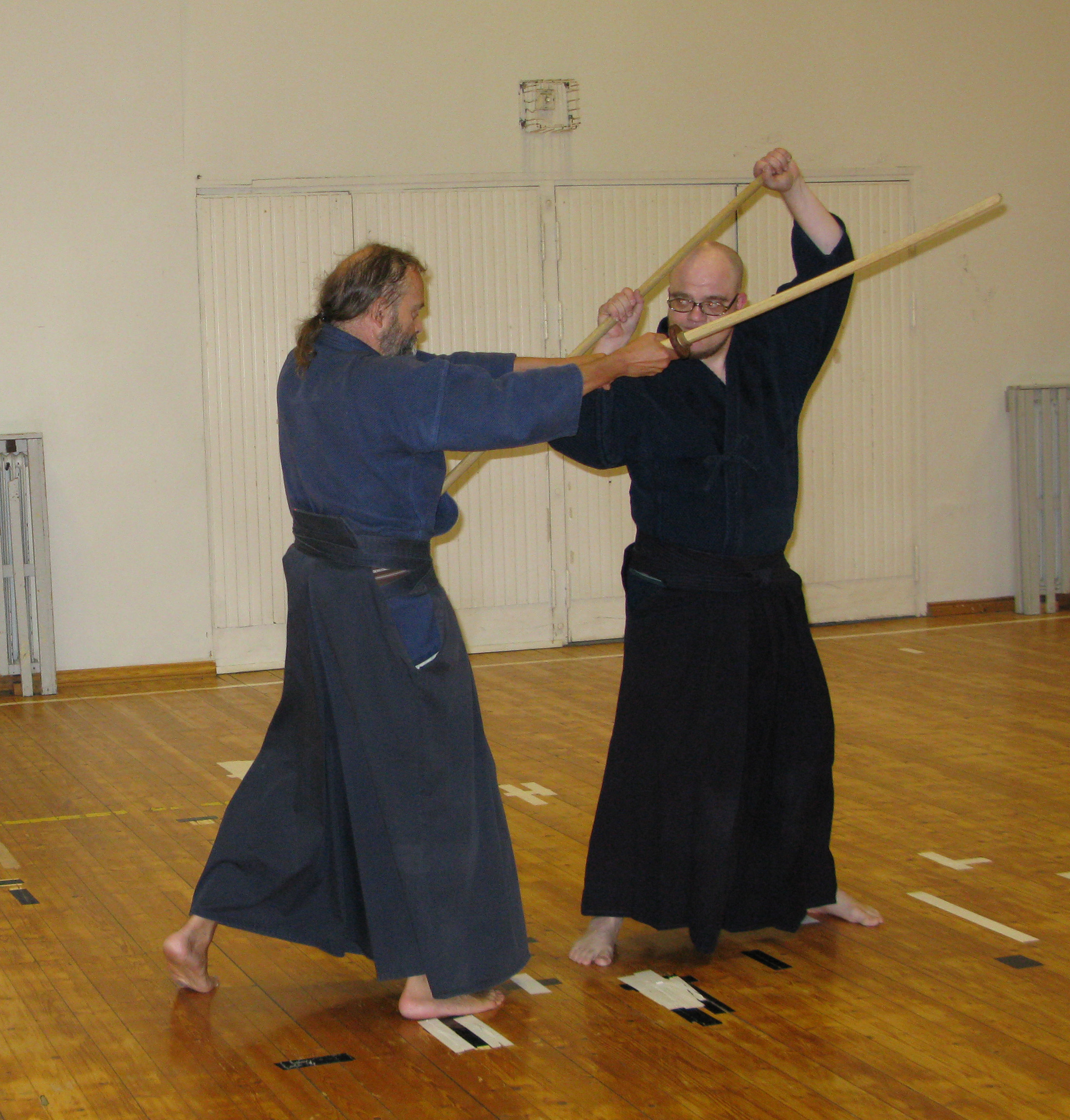 Old Japanese Martial art called Jodo. Kata: Rai Uchi / kuva Japanilaisen kamppailulajin Jodon kata, Rai Uchi